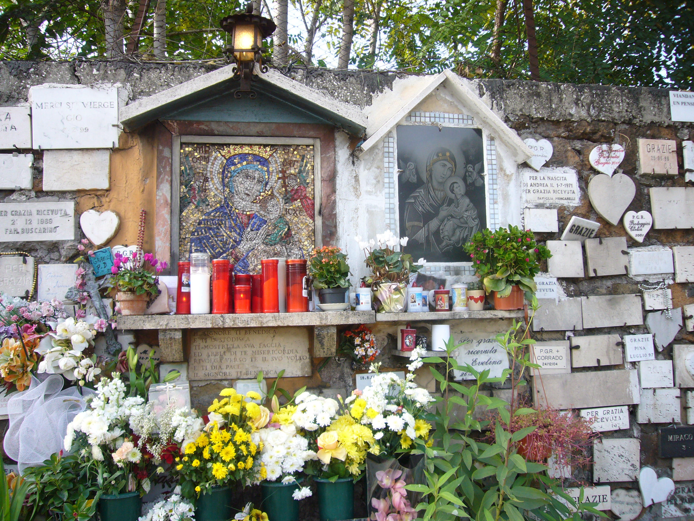 Roma, Madonna del Buon Consiglio a largo Preneste. Tra gli ex voto, all'icona tradizionale e apparentemente più antica, se n'è affiancata un'altra, con un'aria di cristianesimo orientale.